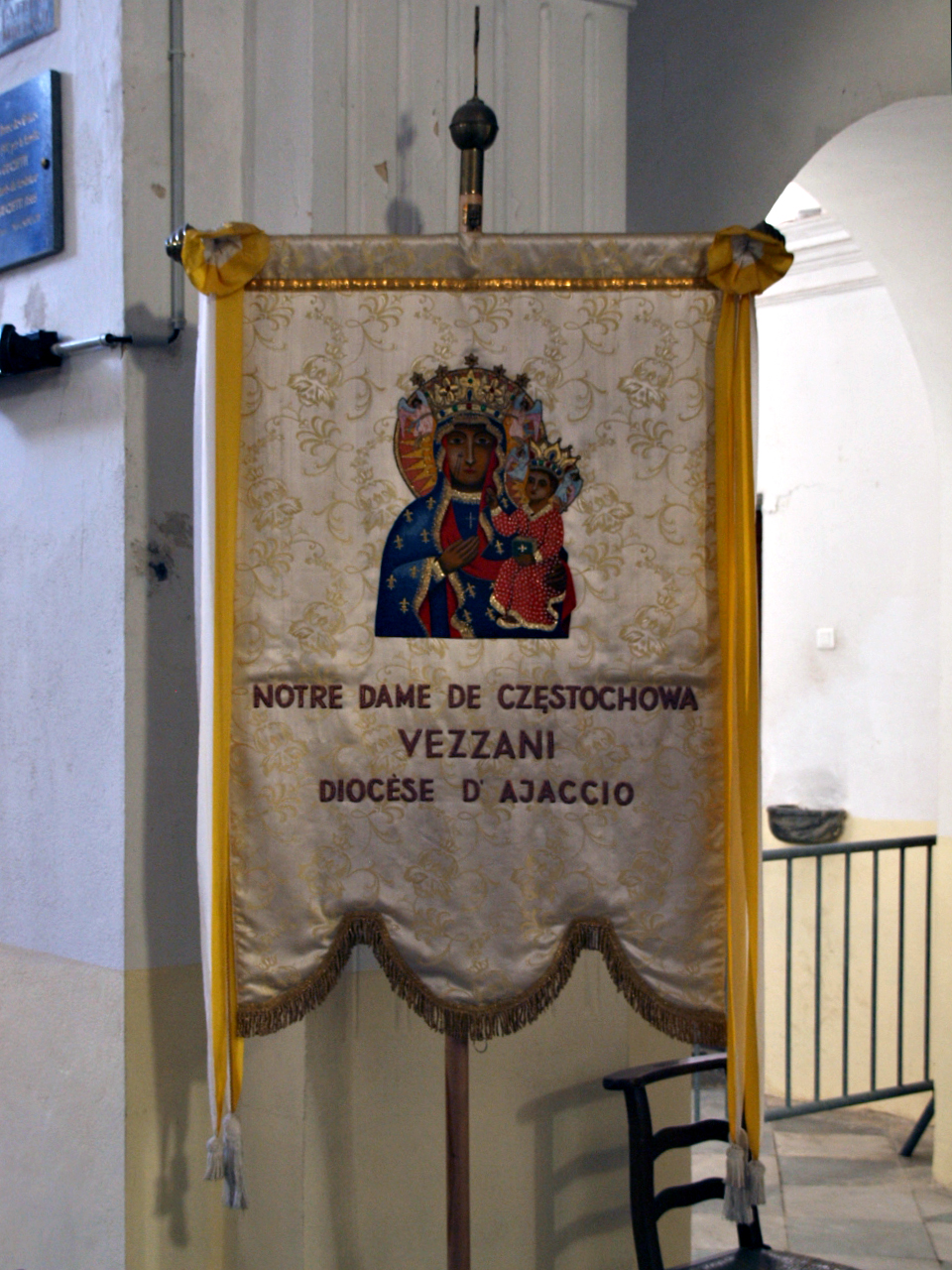 Vezzani (Corse) - Bannière de procession dans l'église de l'Annonciation